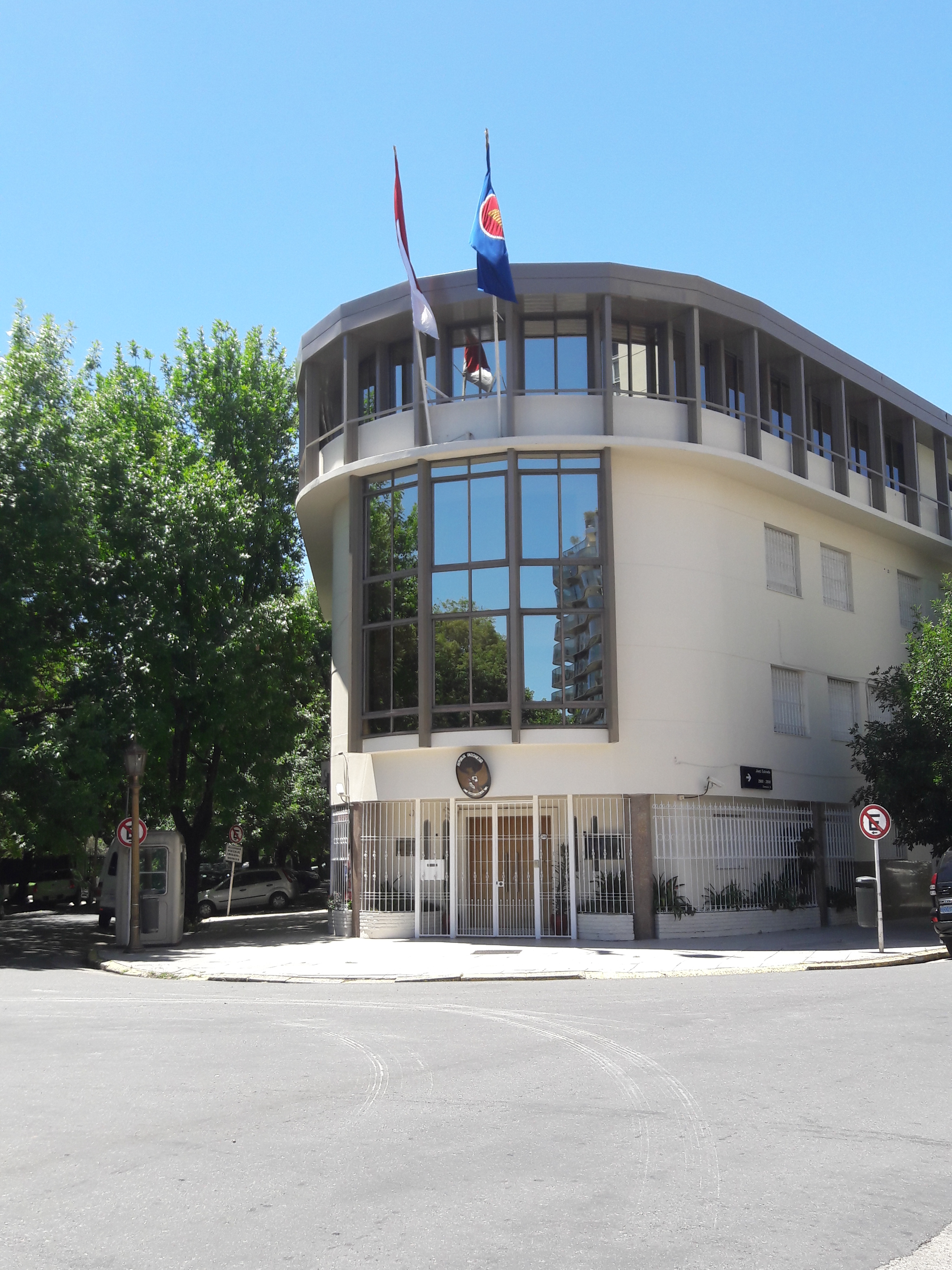 Embajada de Indonesia. Palermo, Buenos Aires, Argentina.